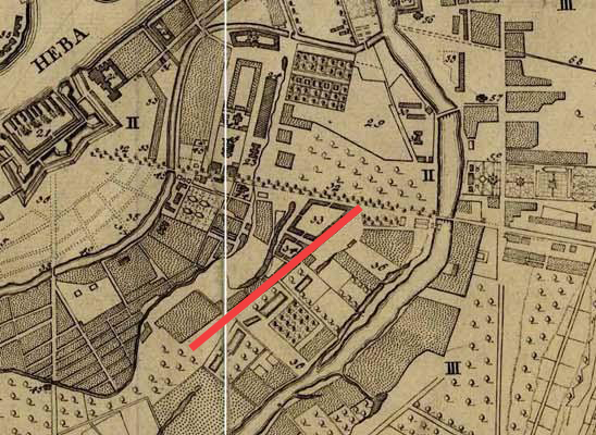 Фрагмент "Плана Императорского столичного города Санкт-Петербурга, сочиненого в 1737 году." Гравюра на меди. Гравер: Унферцахт Г. И.